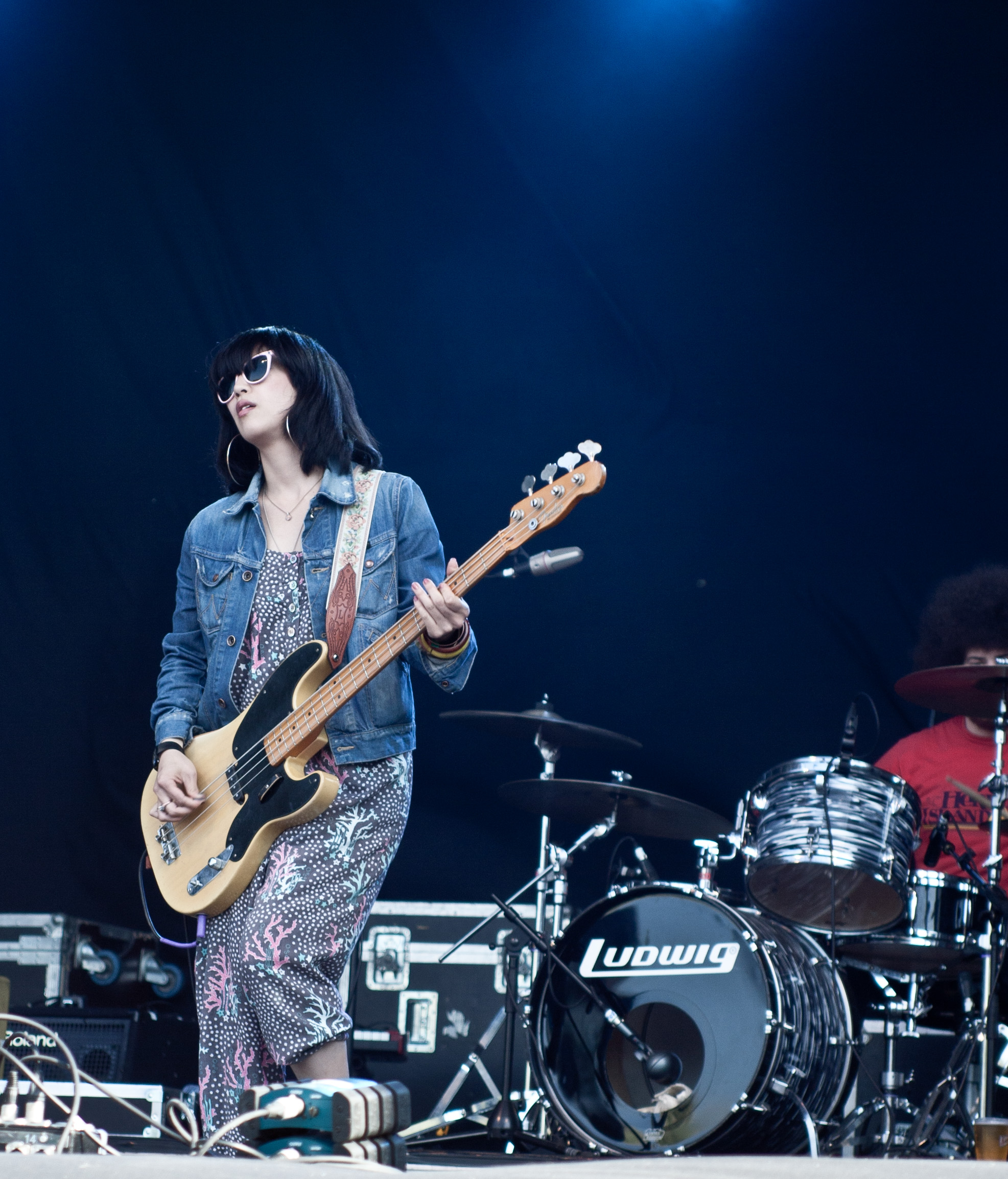 Yuck